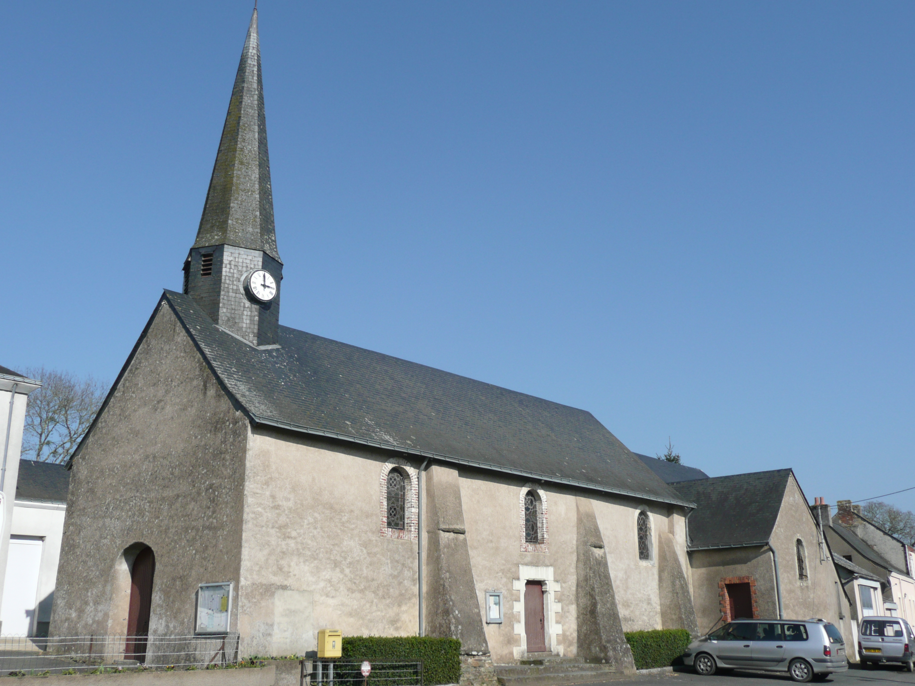 Eglise de la commune de Vergonnes.